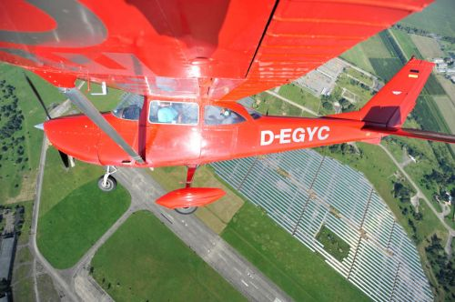 Flugbetrieb mit Cessna F 172 H am Flugplatz Werneuchen im Bundesland Brandenburg